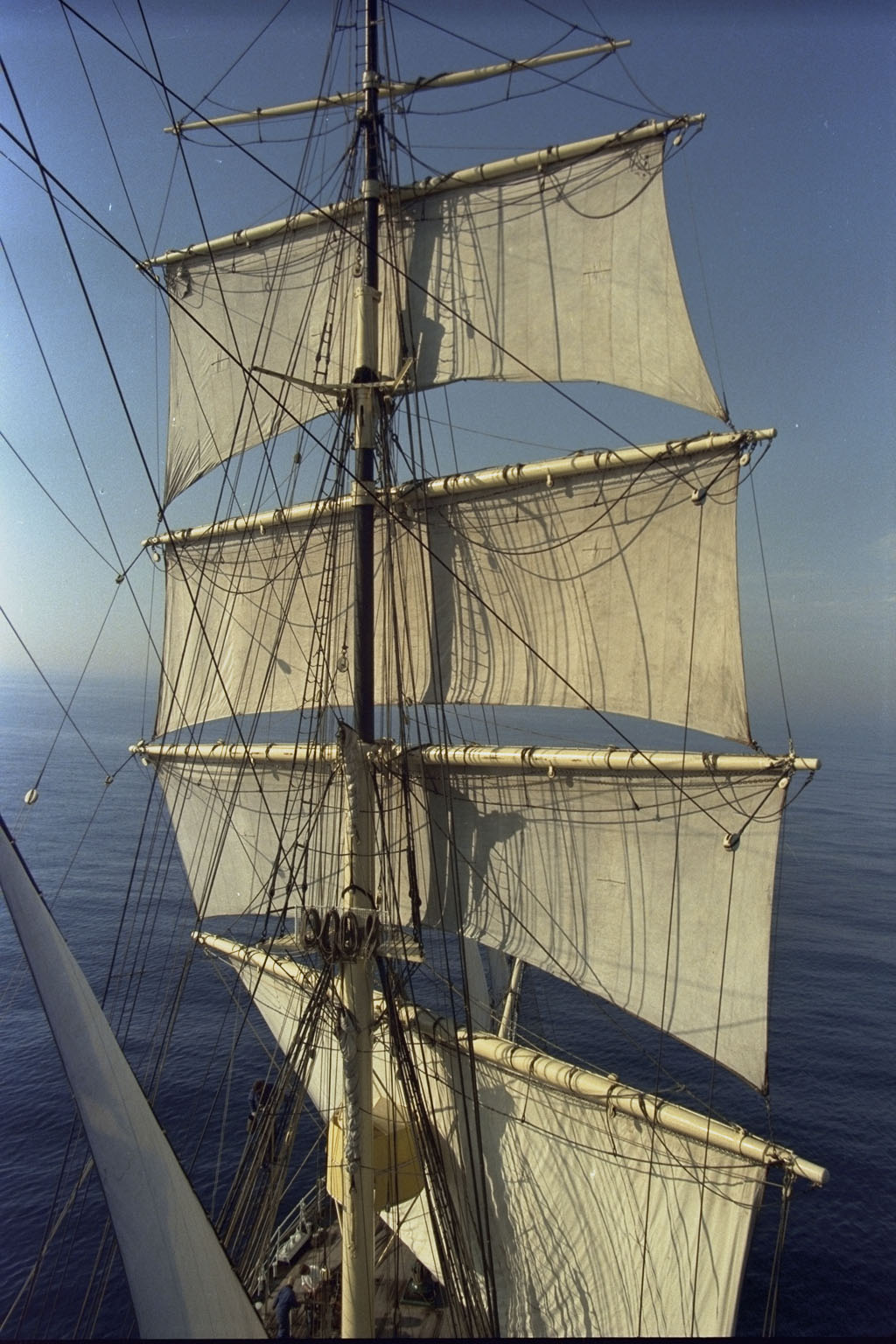 Råsejl på fortoppen af skoleskibet Danmark